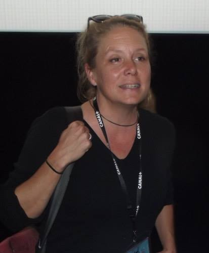 Lauren MacMullan au Festival International du Film d'Animation d'Annecy le 11 juin 2013